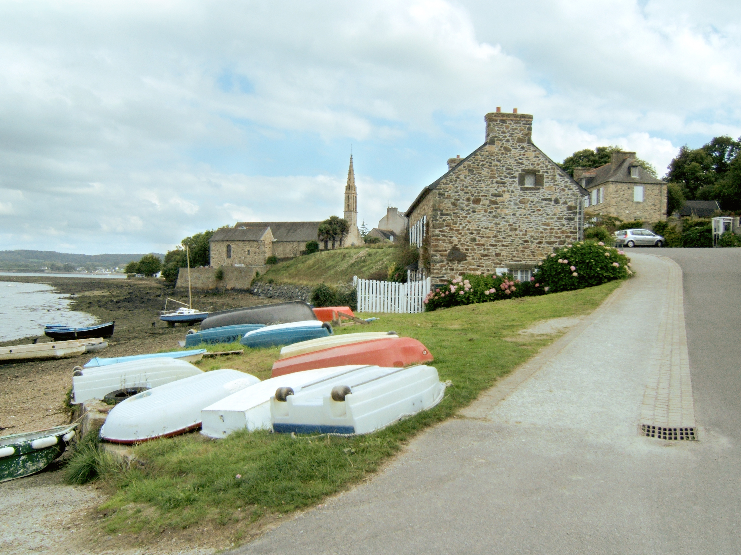 Port Maria à Landévennec sur la Presqu'île de Crozon dans le Finistère. En arrière plan, l'église Notre-Dame datant du XVIIe siècle avec son cimetière marin.